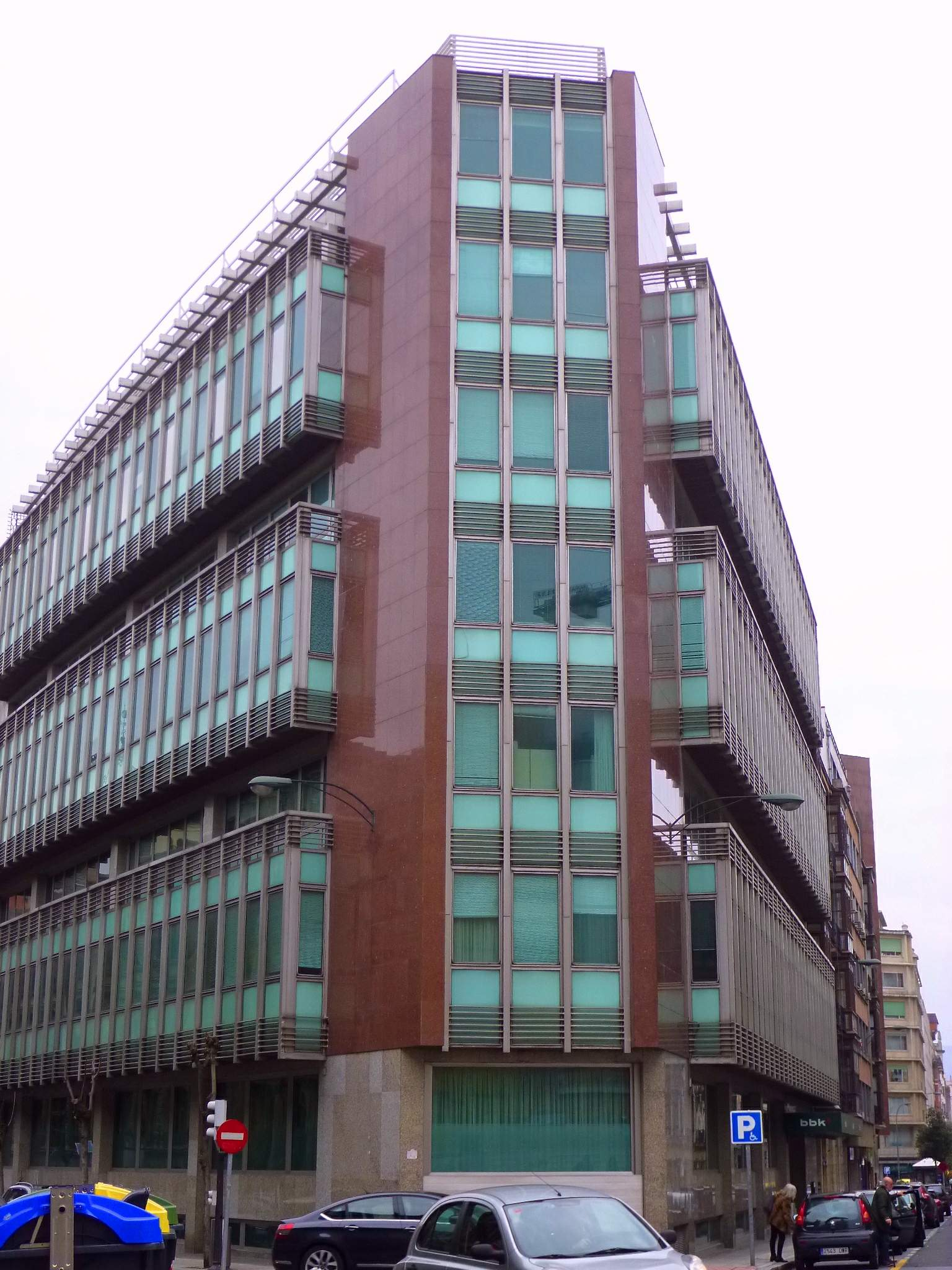 Bilbao - Oficina de Kutxabank en la calle Rodrígurez Arias, 1